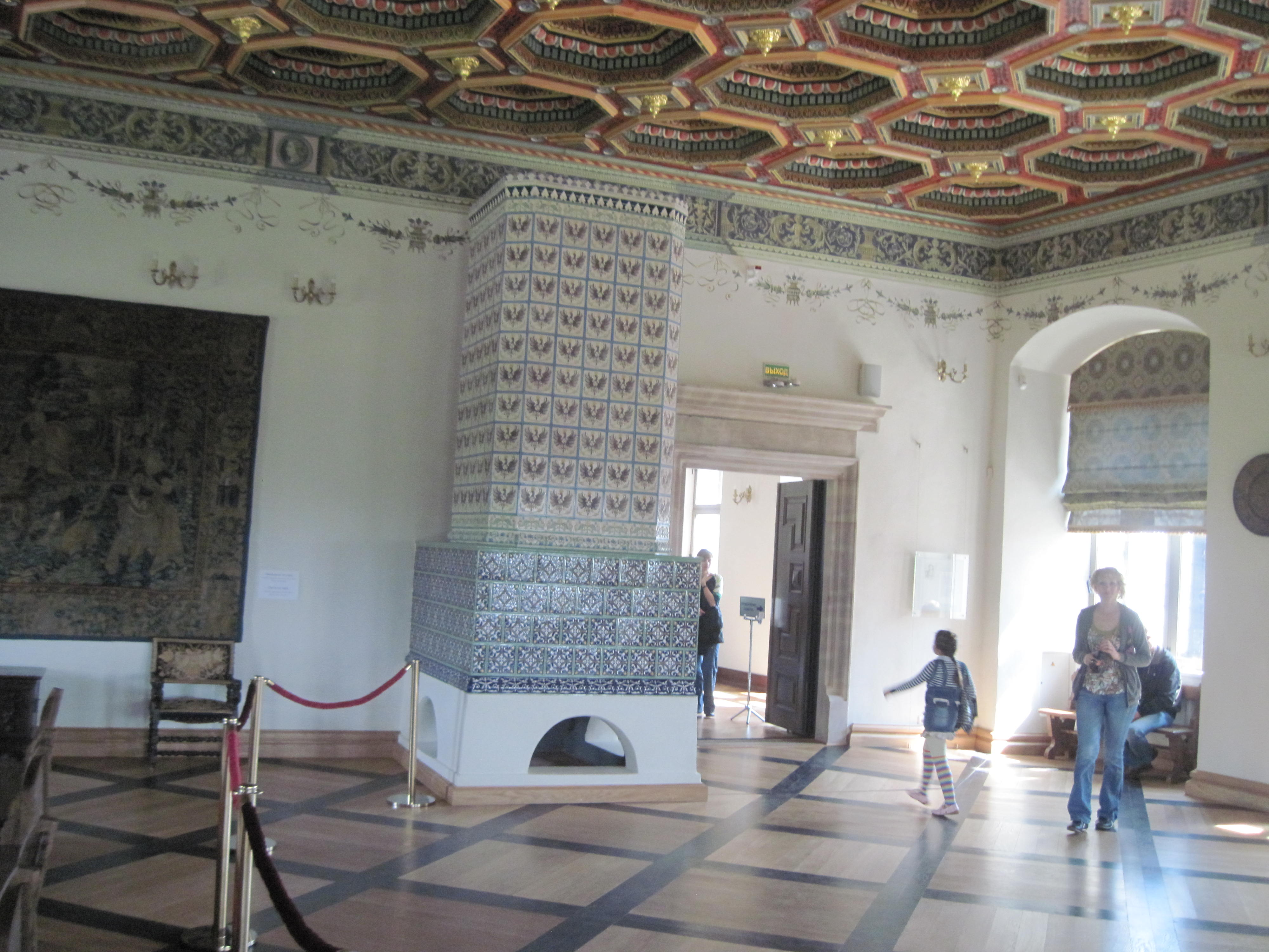 Інтер'еры Мірскага замка